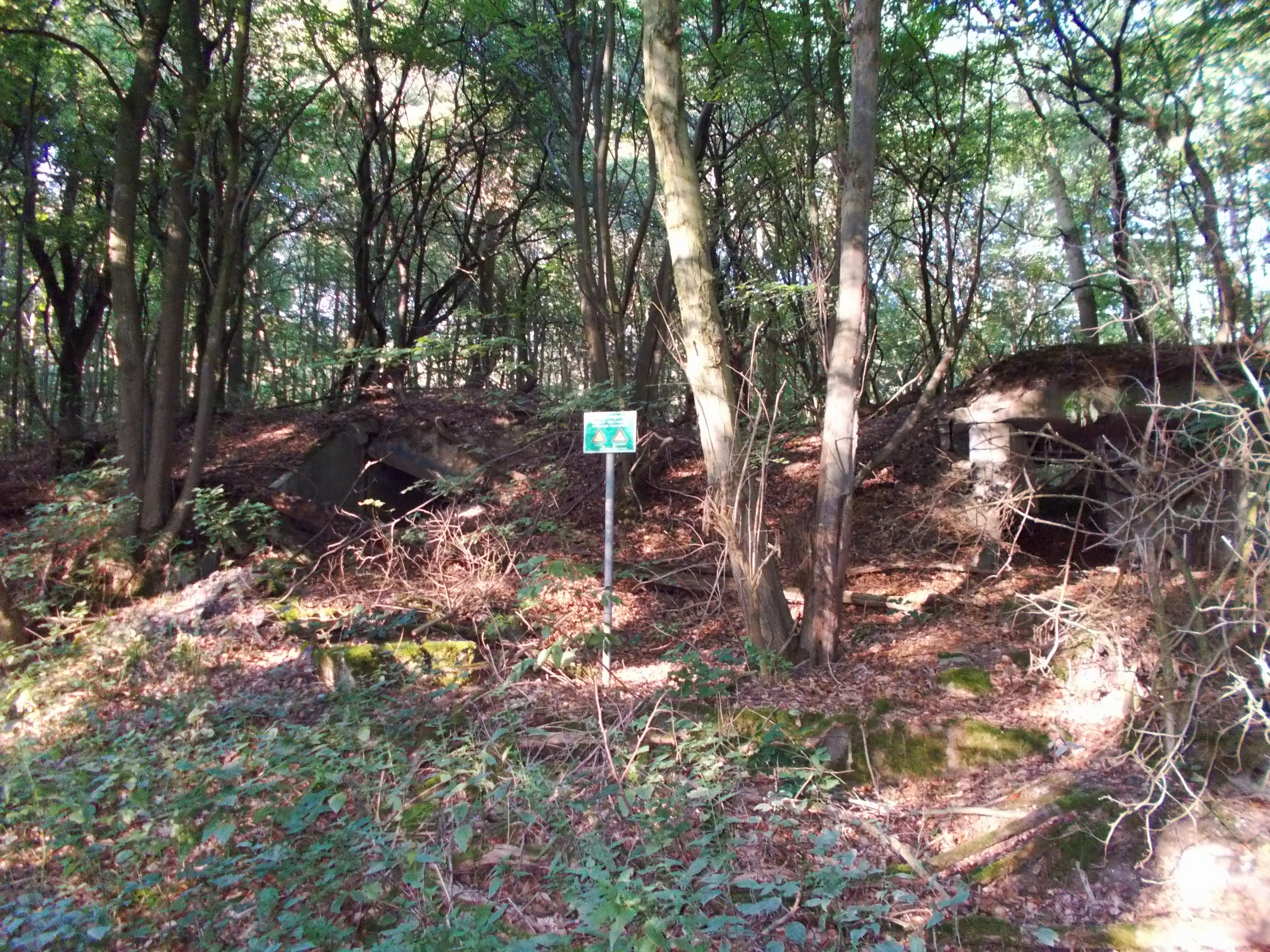 Überreste der Munitionlagerhäuser am Wegesrand in der Hees (Xanten).